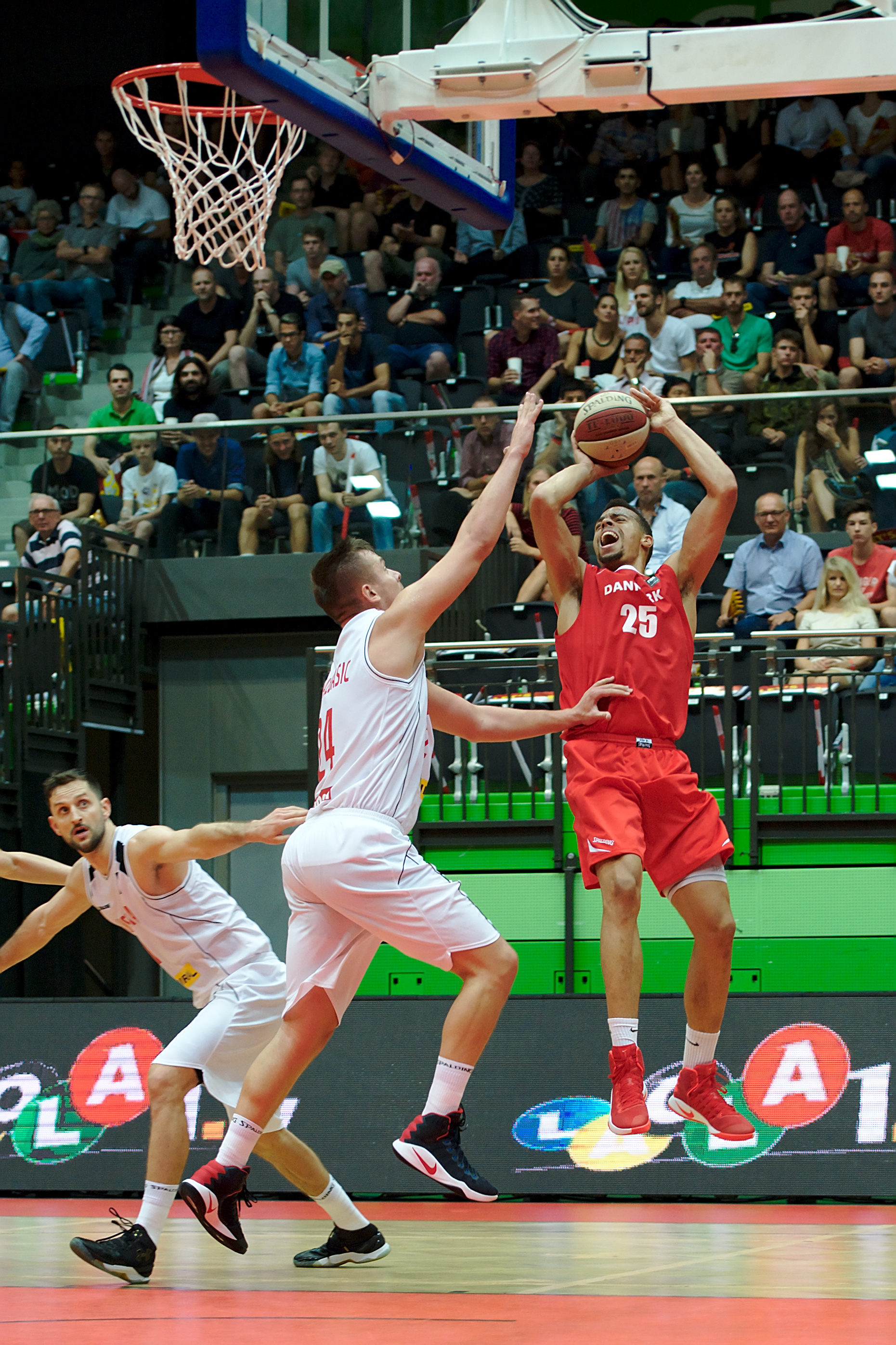 FIBA-Basketball EM-Qualifikation am 7.9.2016 im Multiversum in Schwechat, Österreich - Dänemark. Bild zeigt Jonas Bergstedt (DEN).